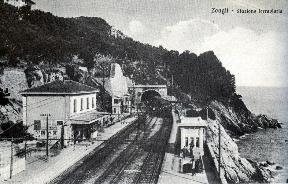 La stazione ferroviaria di Zoagli negli anni venti del XX secolo, Liguria, Italia